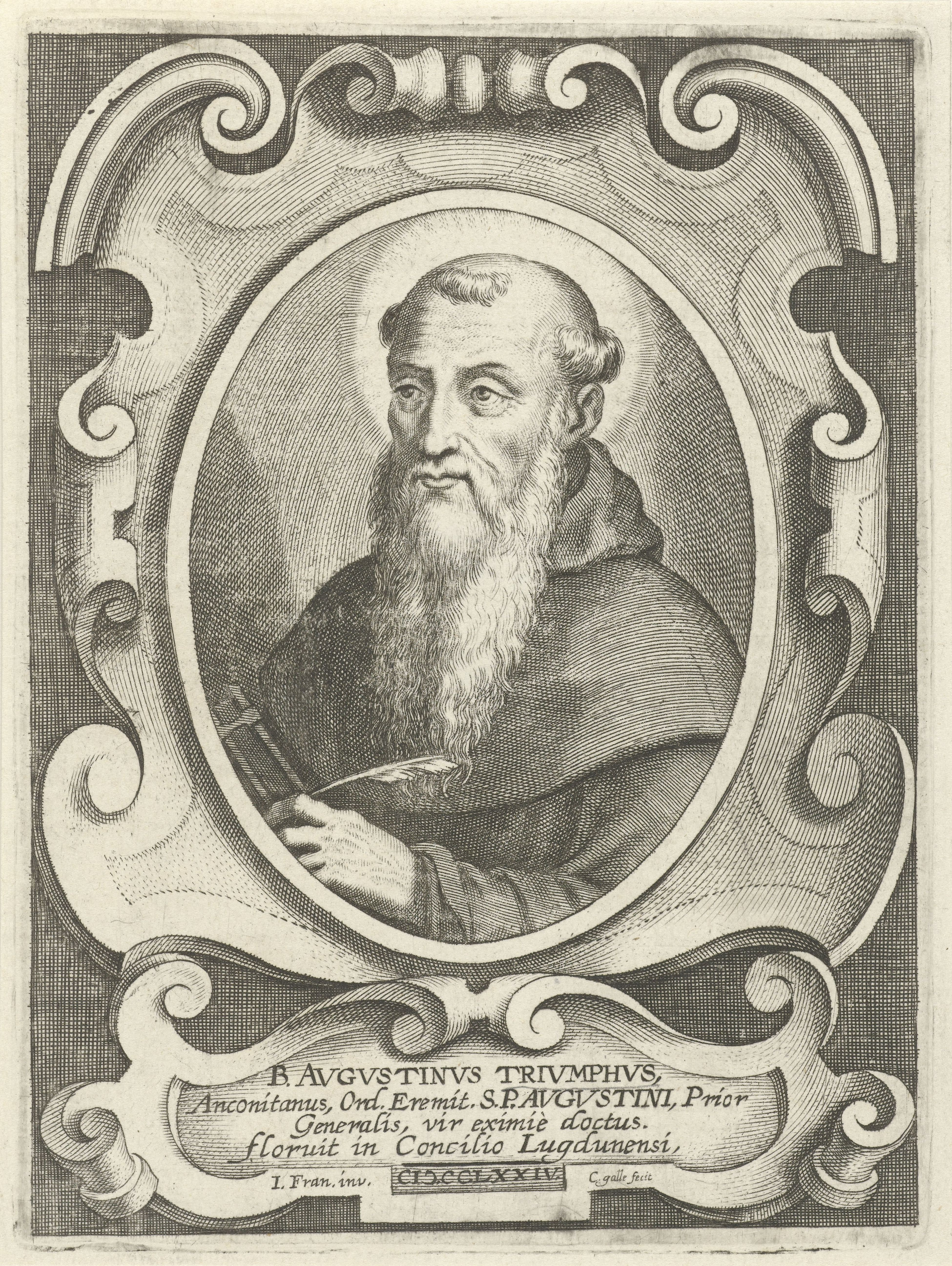 IdentificatieTitel(s): Portret van Augustinus de AnconaObjecttype: prent boekillustratie Objectnummer: RP-P-1909-4439Catalogusreferentie: Hollstein Dutch 345-374Opschriften / Merken: verzamelaarsmerk, verso, gestempeld: Lugt 2228VervaardigingVervaardiger: prentmaker: Cornelis Galle (I) (vermeld op object)naar ontwerp van: Jacques Franckaert (II) (vermeld op object)Plaats vervaardiging: Zuidelijke NederlandenDatering: 1636Fysieke kenmerken: gravureMateriaal: papier Techniek: graveren (drukprocedé)Afmetingen: plaatrand: h 135 mm × b 105 mmToelichtingBoekillustratie voor: C. Curtius, Virorum illustrium ex ordine Eremitarum D. Augustini elogia , Antwerpen: J. Cnobbaert, 1636.OnderwerpWat: monastic orders, monastic life ~ Roman Catholic churchWie: Augustinus de AnconaVerwerving en rechtenVerwerving: aankoop 1905Copyright: Publiek domein